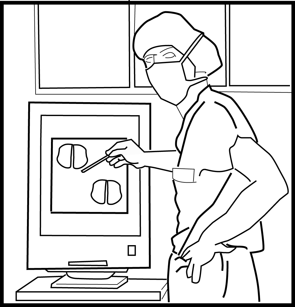 voxel a la medecina